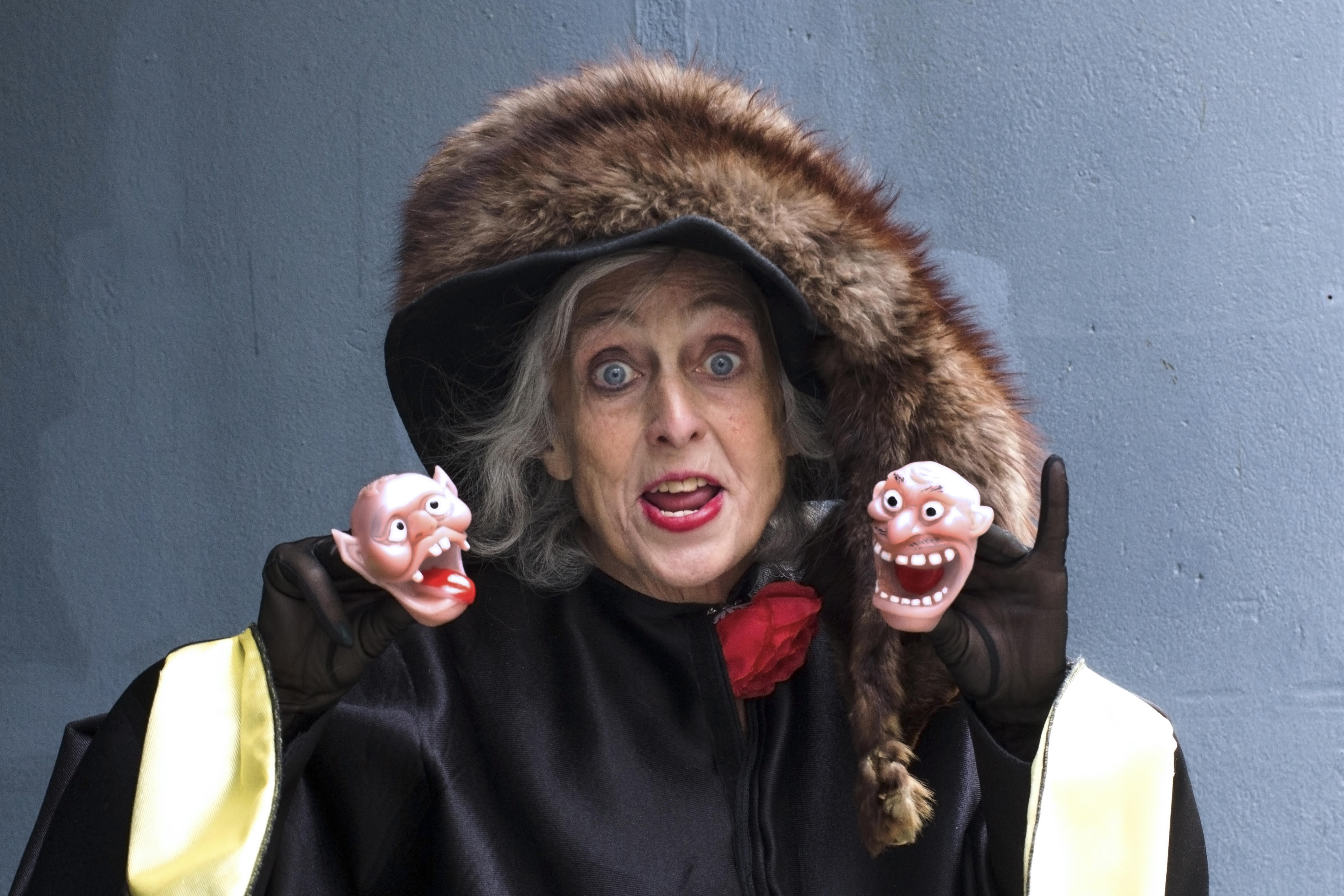 Berit Rusten som stemmerettsforkjemper Fredrikke Marie Qvam. Soloforestilling. Produksjon: Panter Tanter Produksjoner